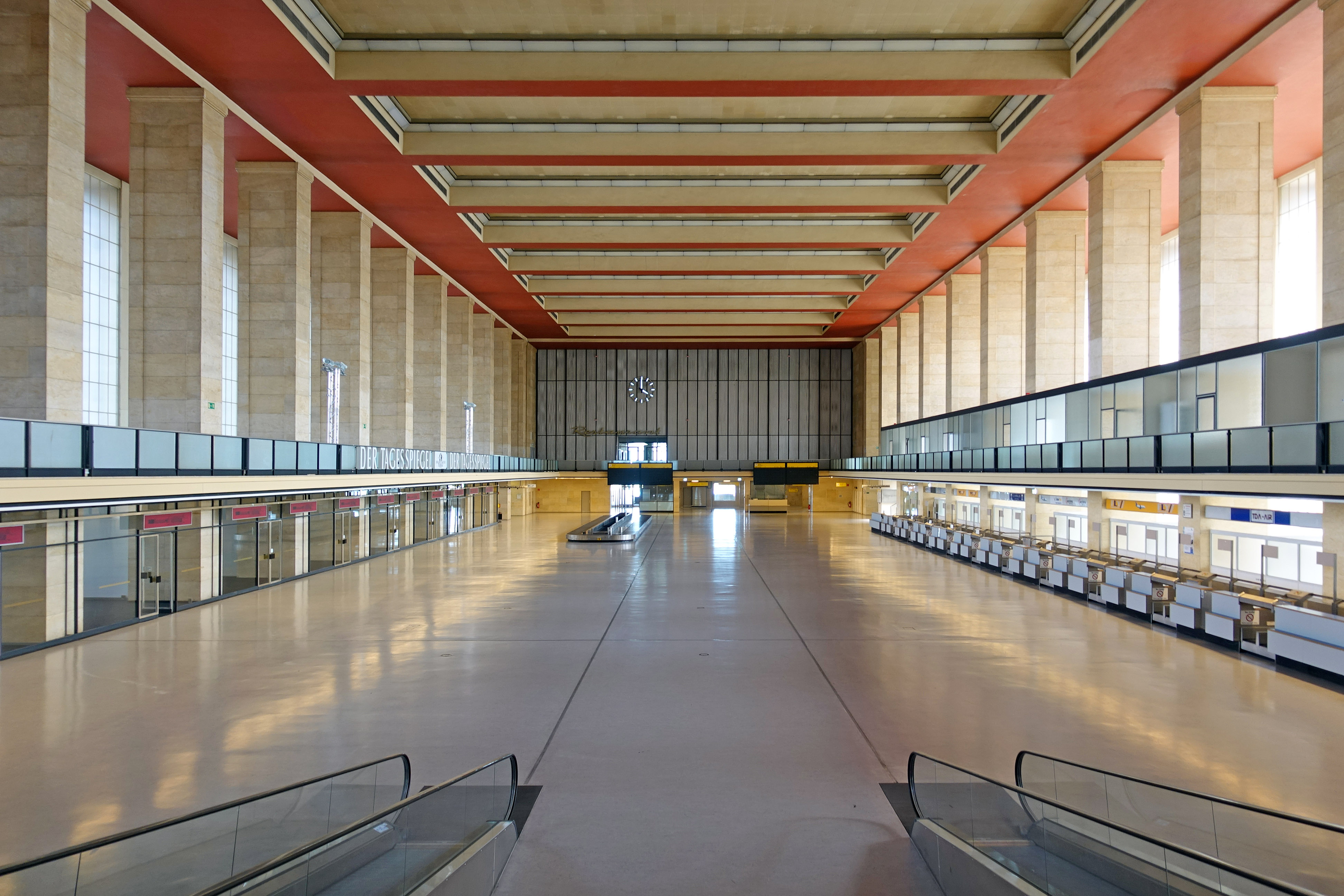 Empfangshalle des ehemaligen Flughafens Tempelhof in Berlin im Juni 2017.